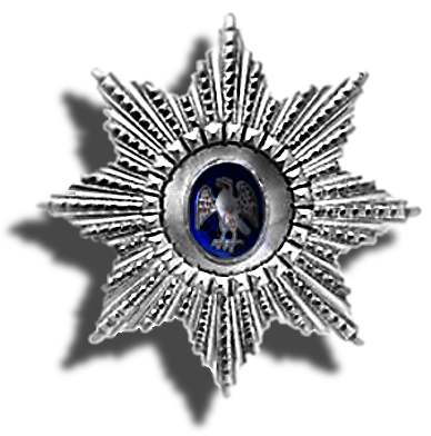 Islannin Haukan ritarikunnan 1. lk. komentajamerkin rintatähti.